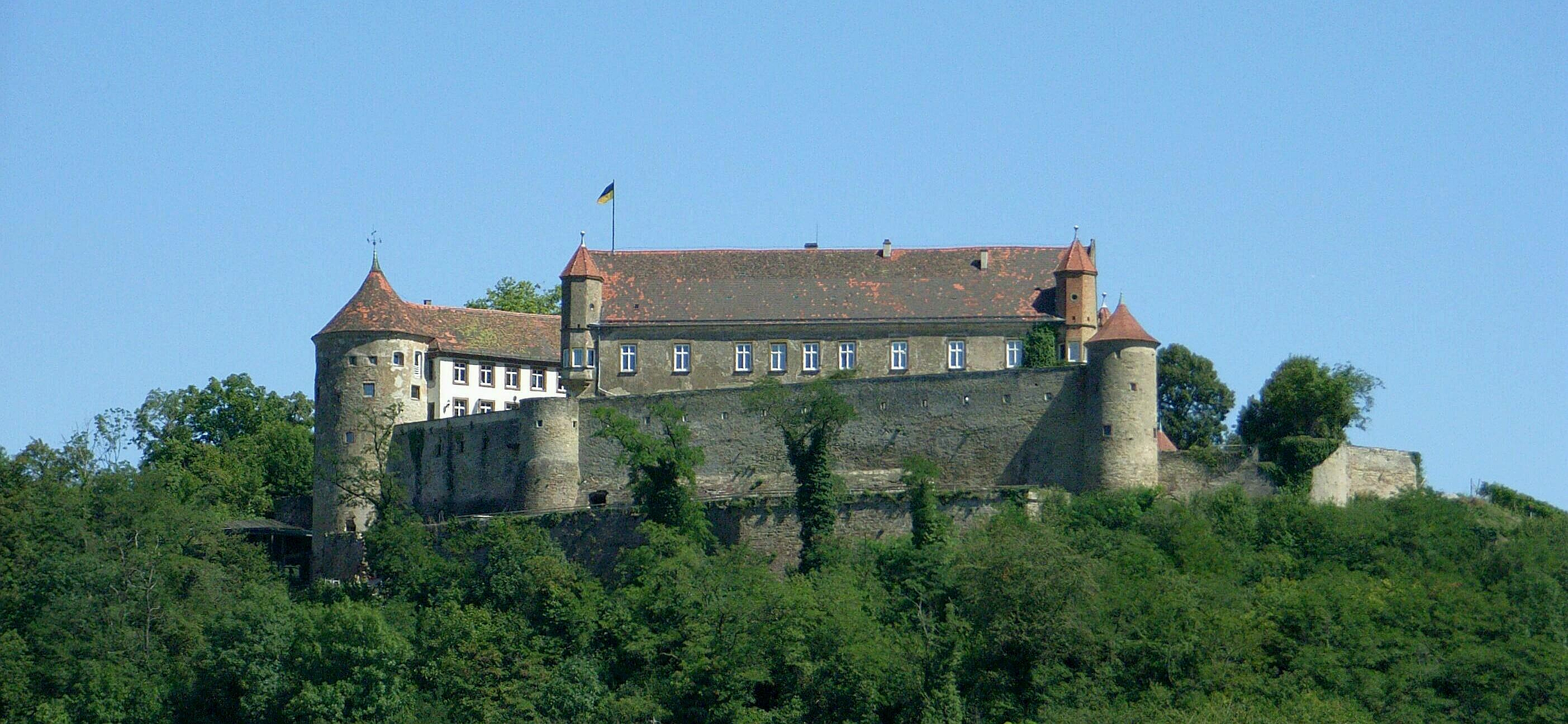 Dieses Bild zeigt die Burg Stettenfels.